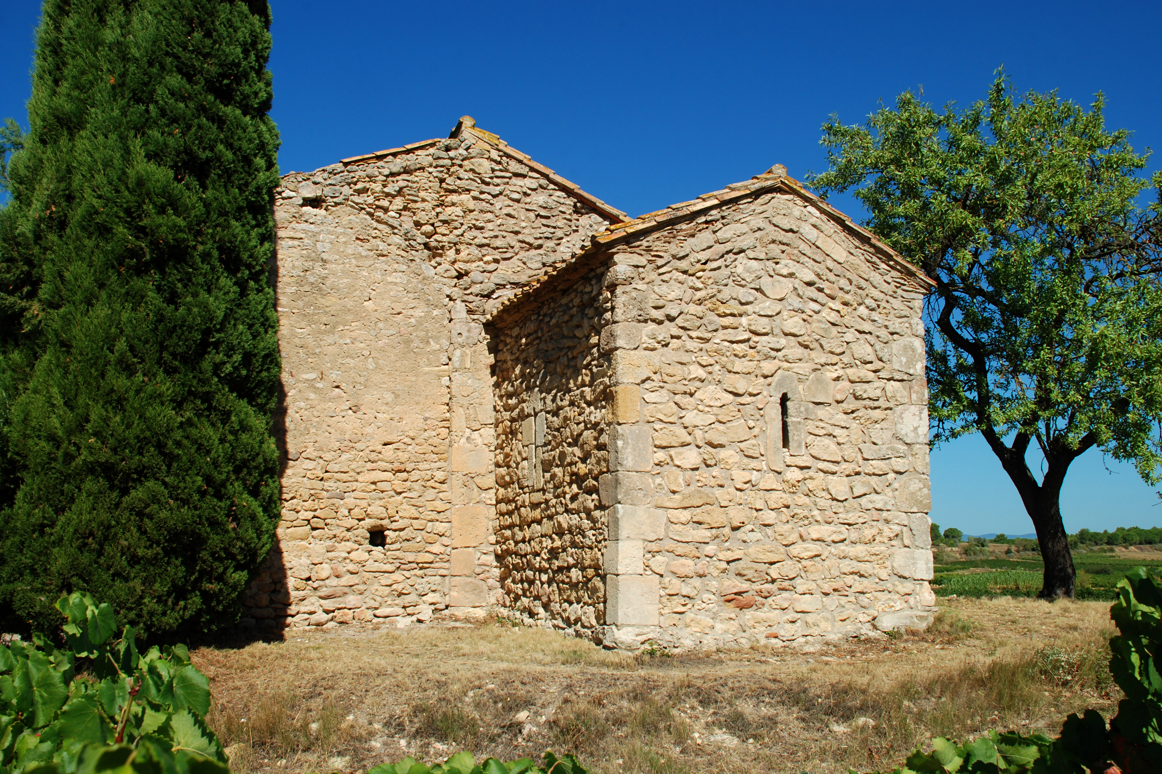 France - Languedoc - Aude - Moussan - chapelle Saint-Laurent (préroman) - chevet carré .